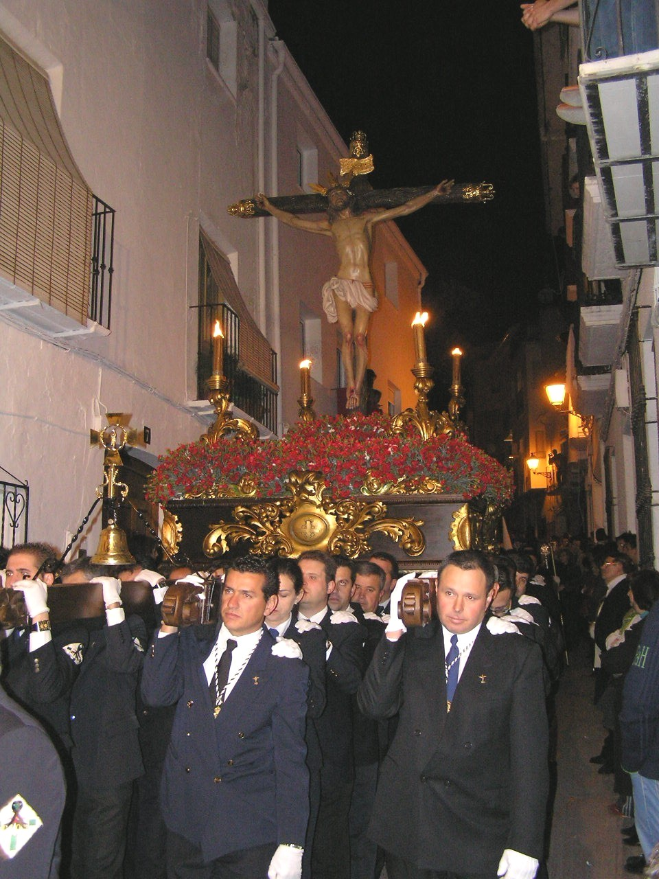 Procesión del Cristo de la Vera Cruz, el Miércoles Santo